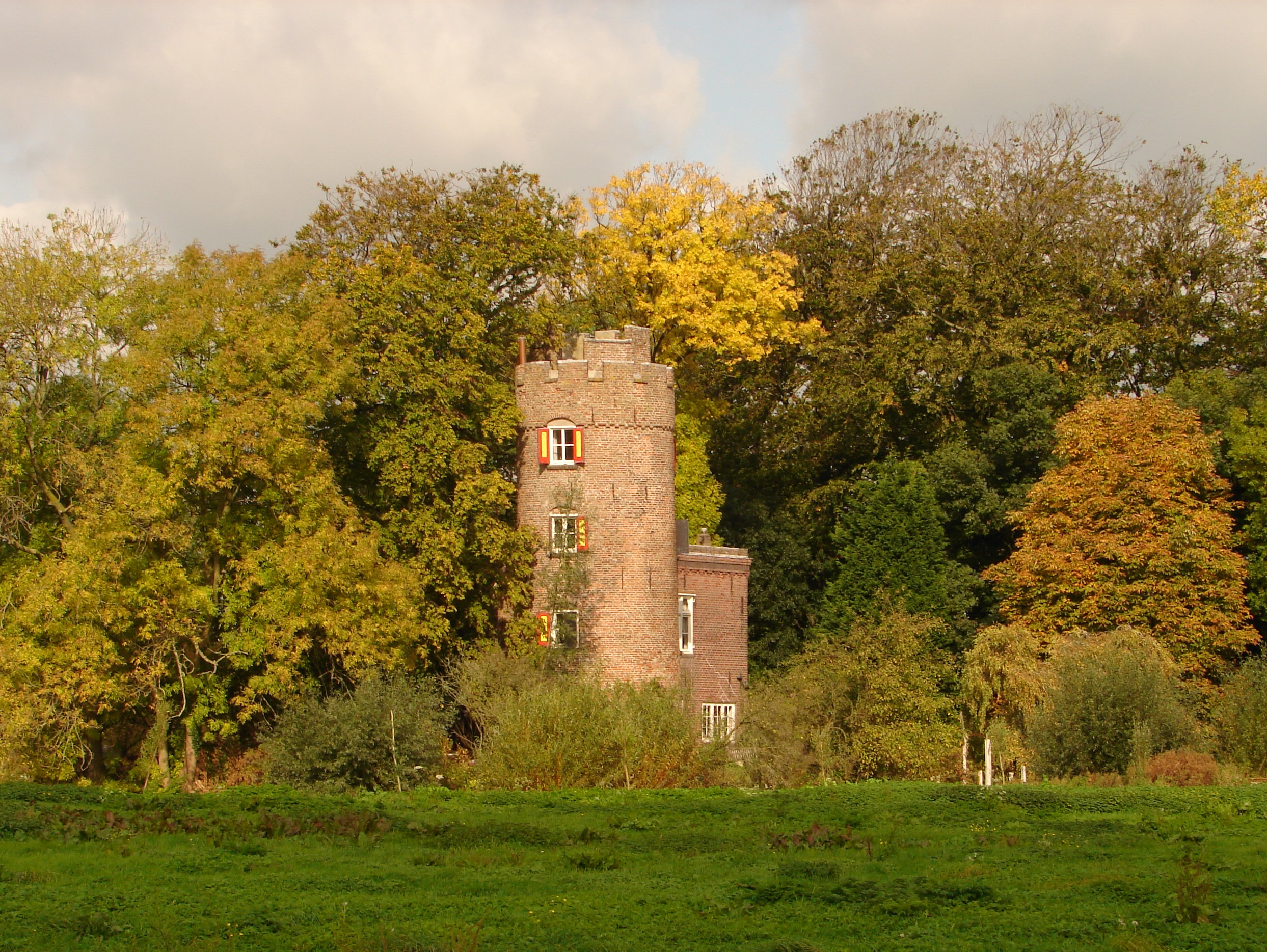 De toren van voormalig kasteel Schonauwen te Houten